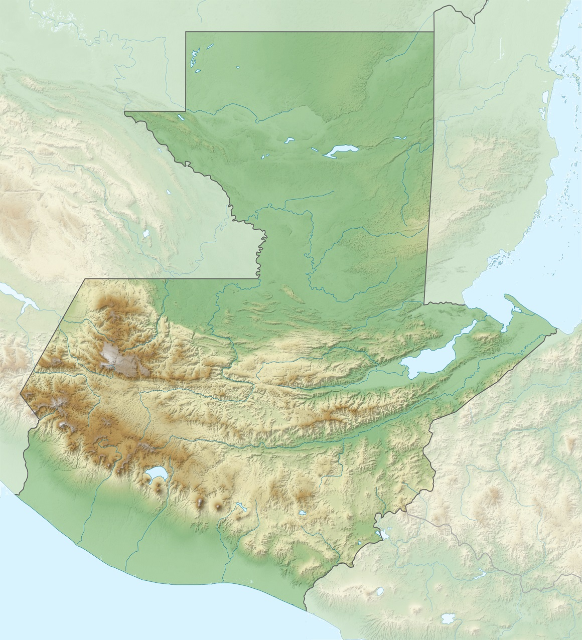 Физическая карта Гватемалы Проекция — равноугольная цилиндрическая Координаты краёв карты: | top = 18.0436 | bottom = 13.5235 | left = -92.3592 | right = -88.0458